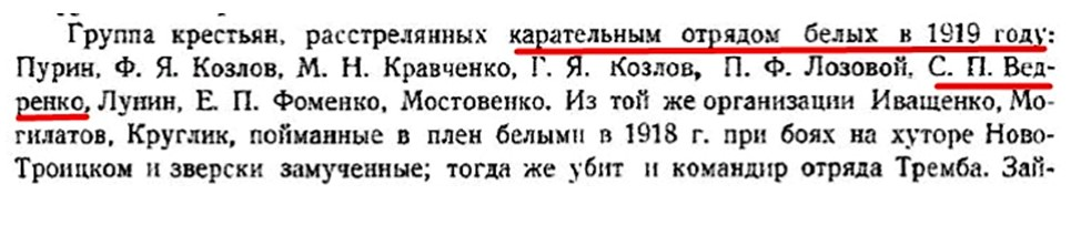 Ведренко